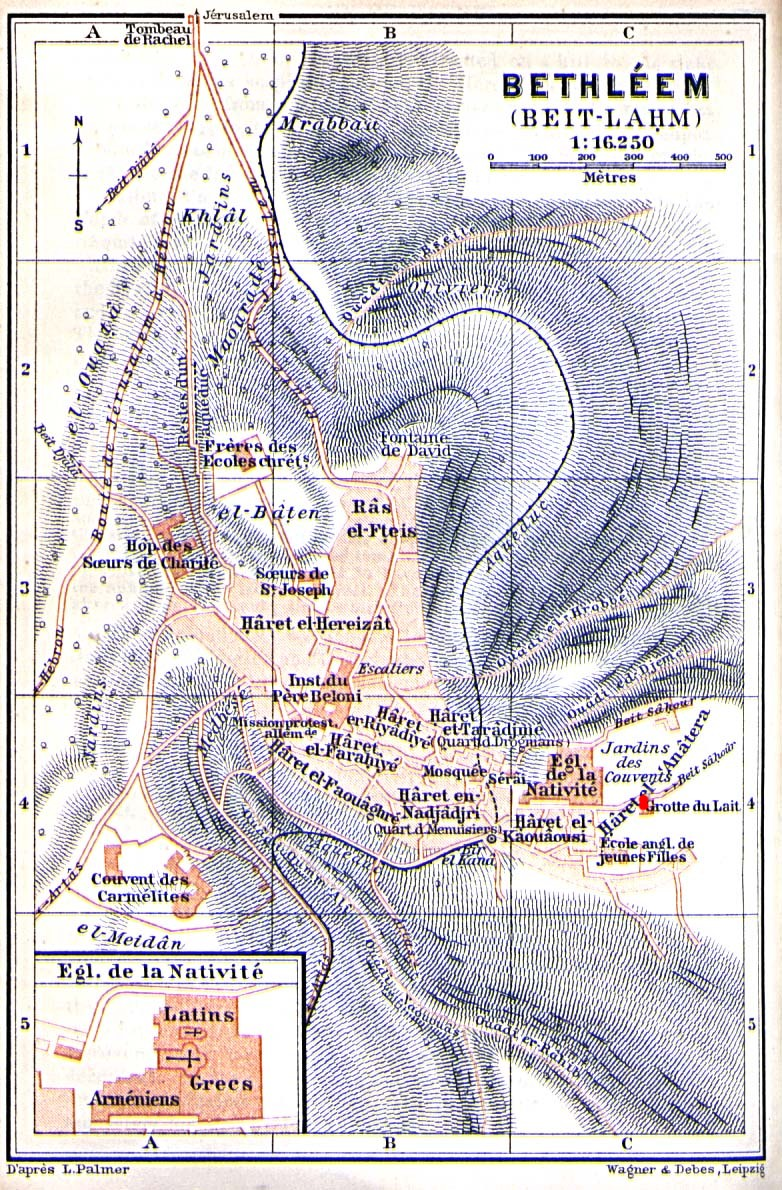 Bethleem From Palestine and Syria...Handbook for Travellers by Karl Baedeker, 5th Edition, 1912